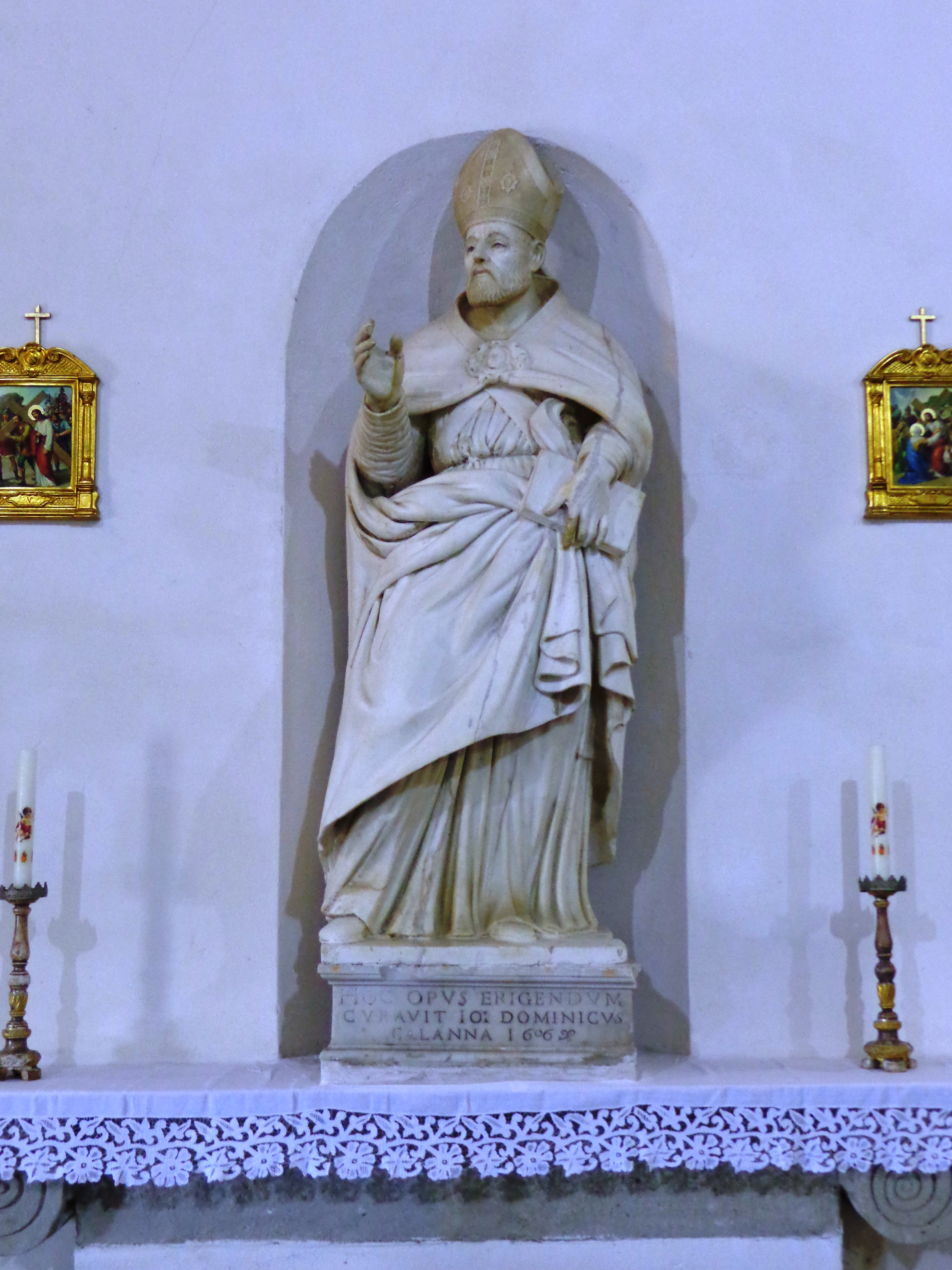 Castroreale_04_2014_08